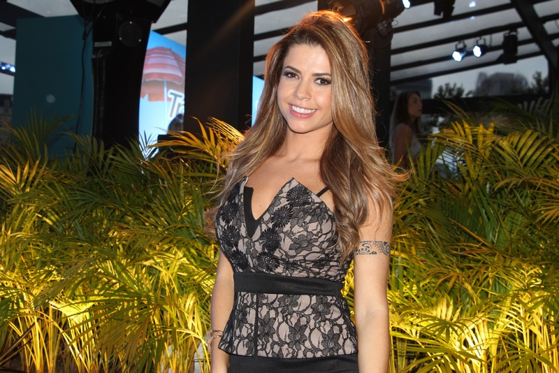 6 - Cacau-005